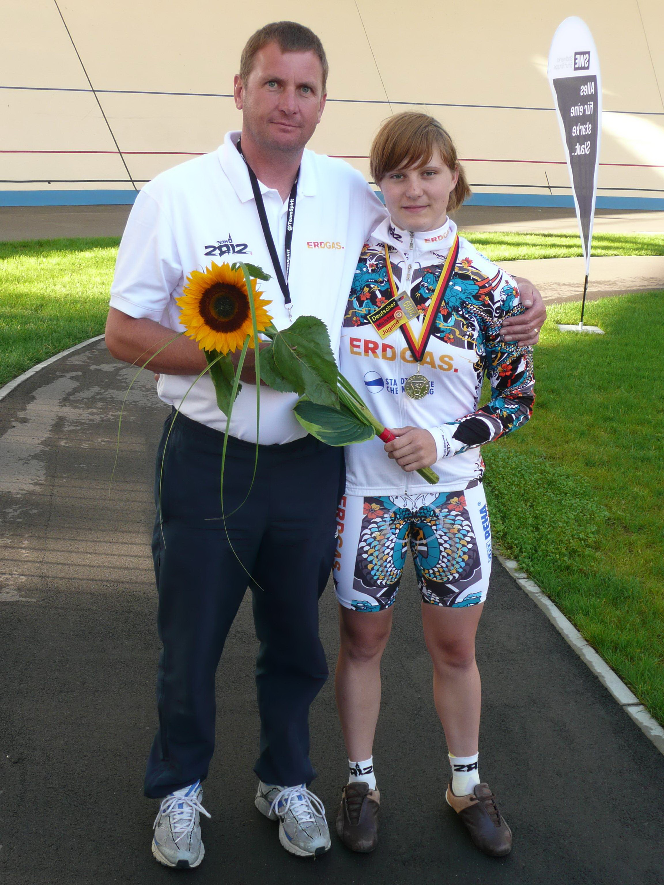 Monika Kendziora, Bahnradsportlerin, mit ihrem Trainer Ralph Müller (Chemnitz)